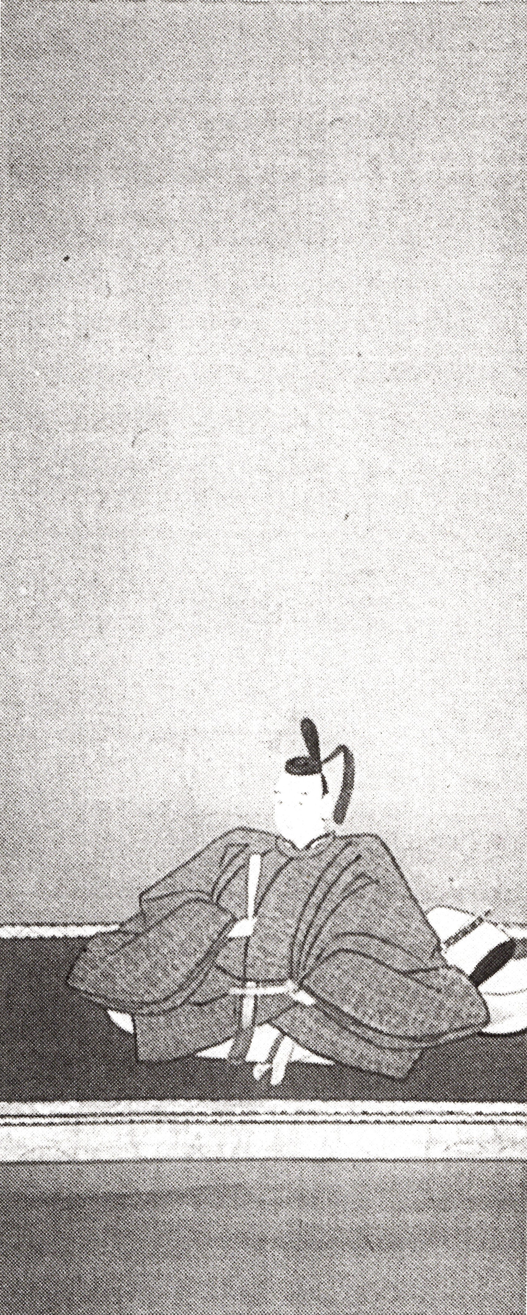 肥後宇土藩4代藩主・細川興里の肖像画。